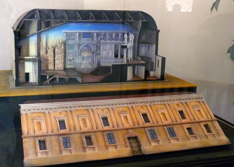 Teatro Olimpico di Sabbioneta - modellino dell'interno e della facciata laterale